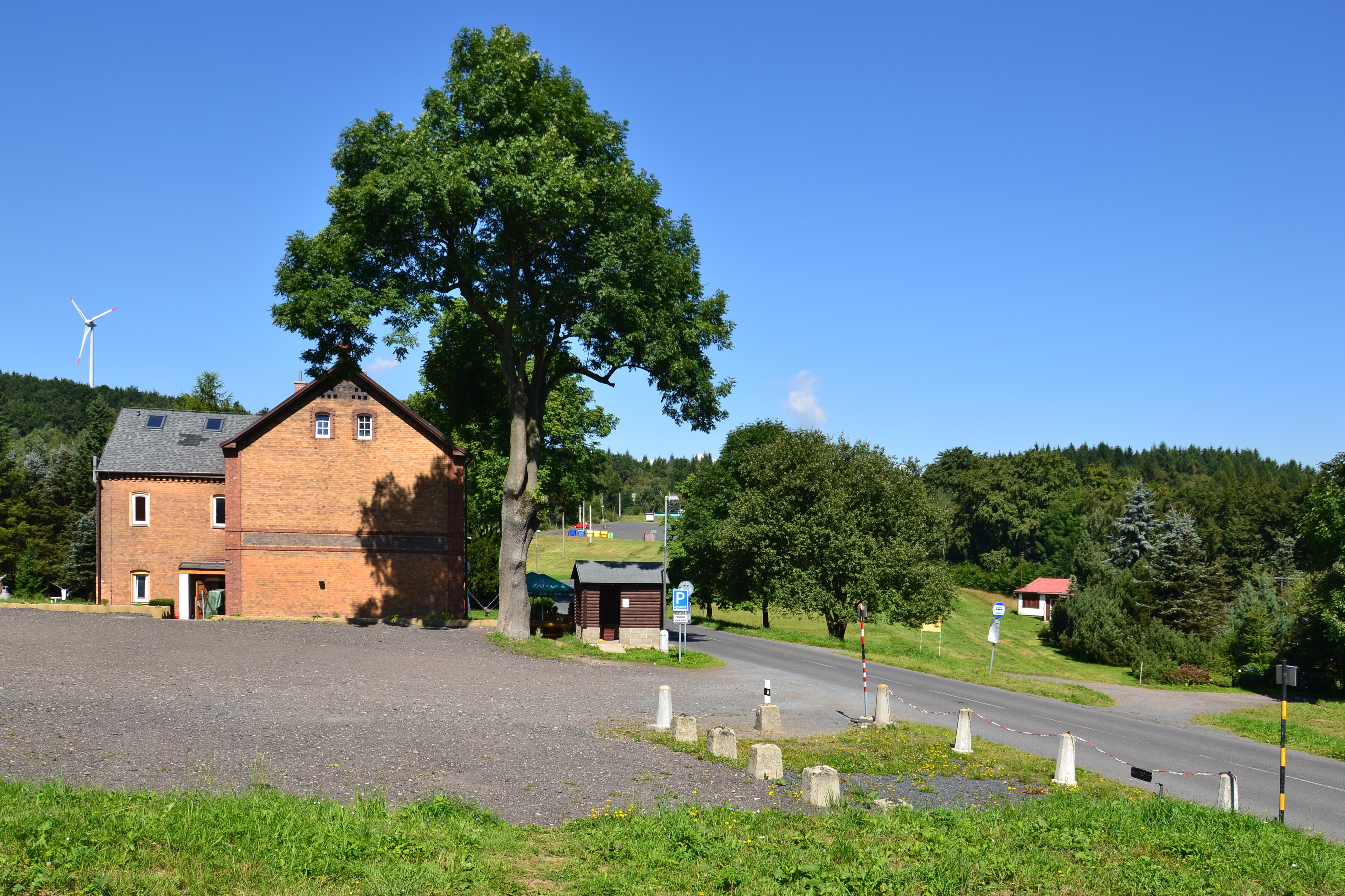 Stará škola